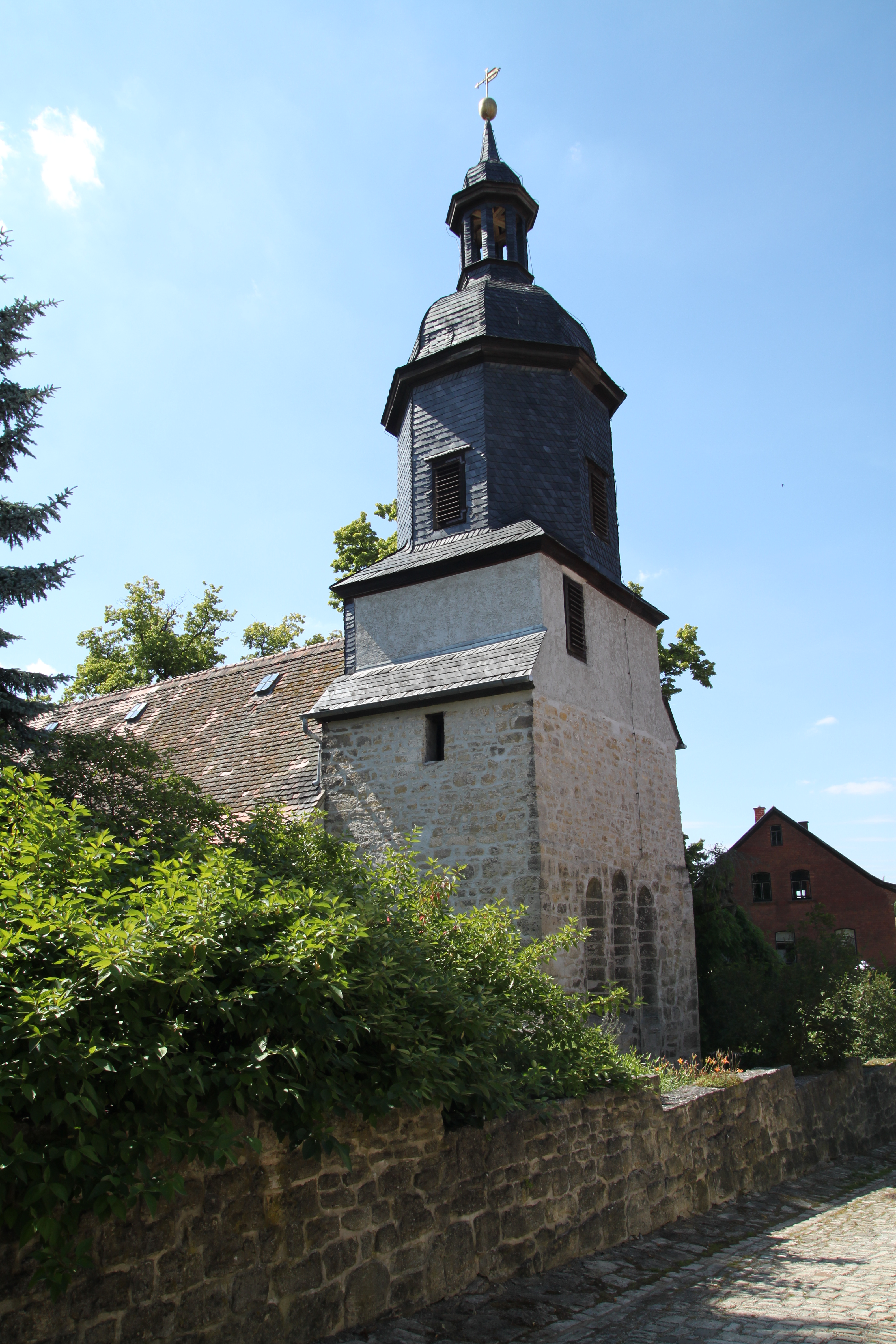 Dorfkirche in Großschwabhausen